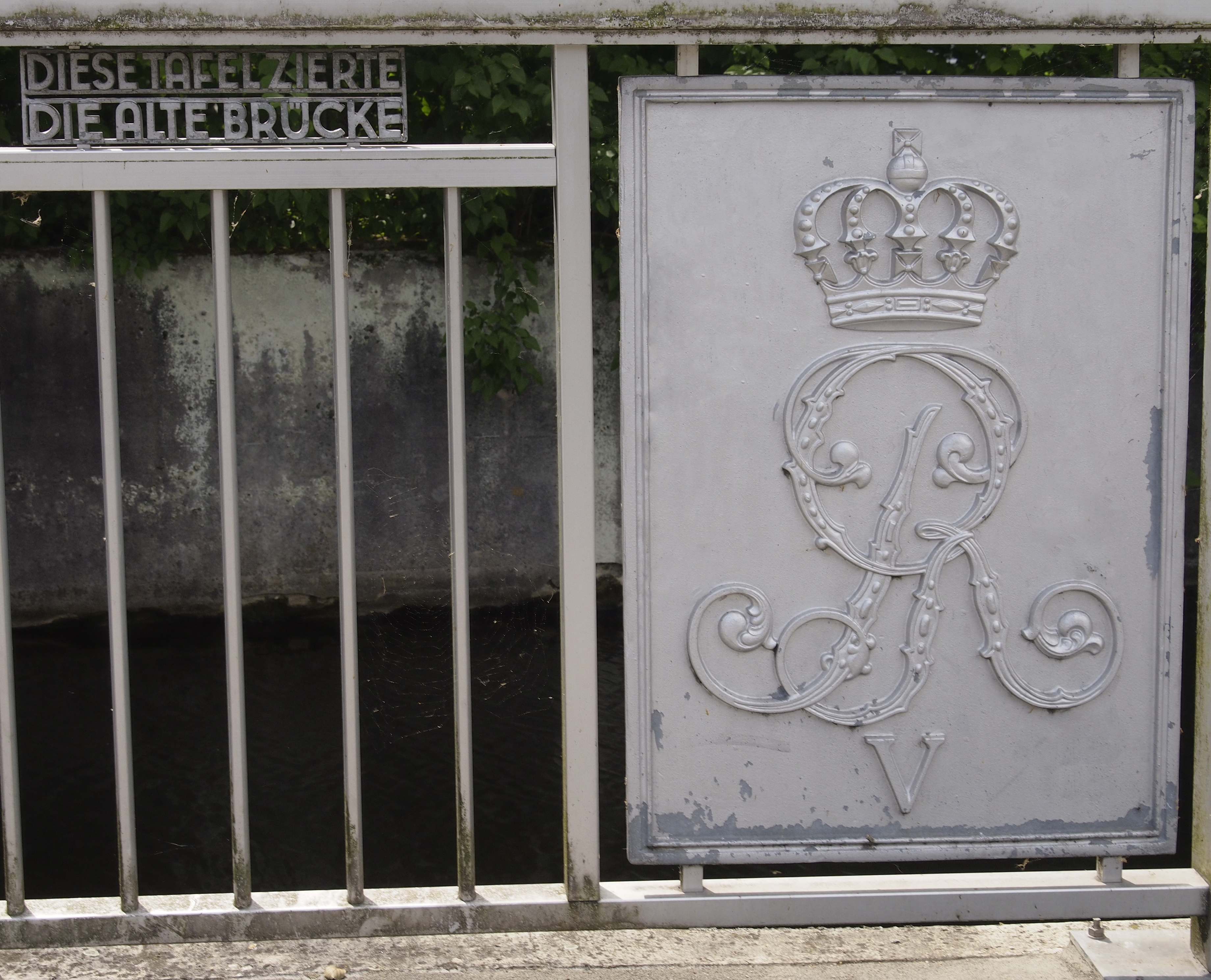 Tafel an der Brücke über den Magnusgraben in Celle, am Osteingang zum Französischen Garten. - Tafel zeigt ein gekröntes kursives Monogramm "GR"(Georgius Rex) von Georg V.